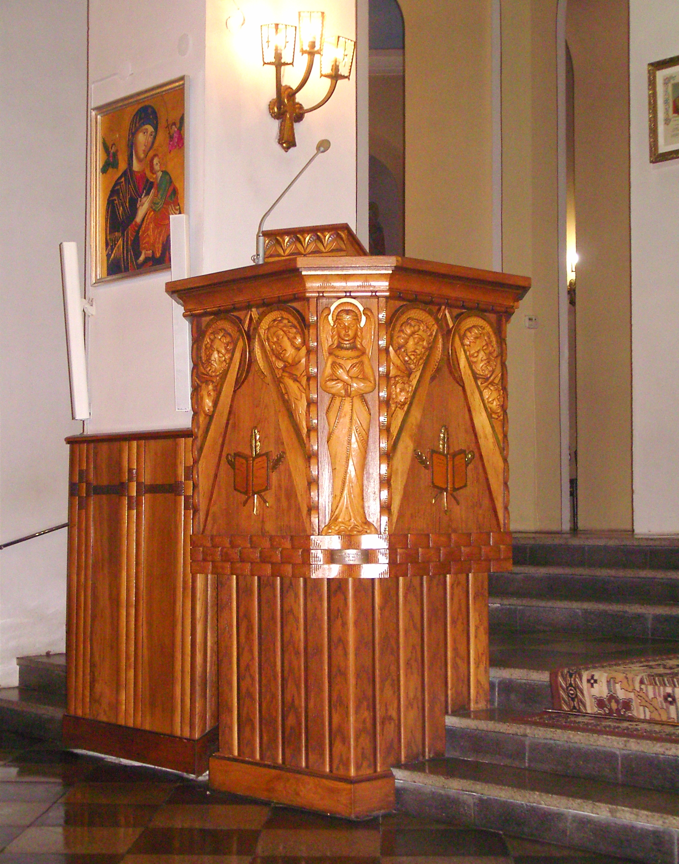 Ambona autorstwa przemyskiego rzeźbiarza Józefa Koczapskiego w kościele Imienia Maryi w Bączalu Dolnym (diecezja rzeszowska)